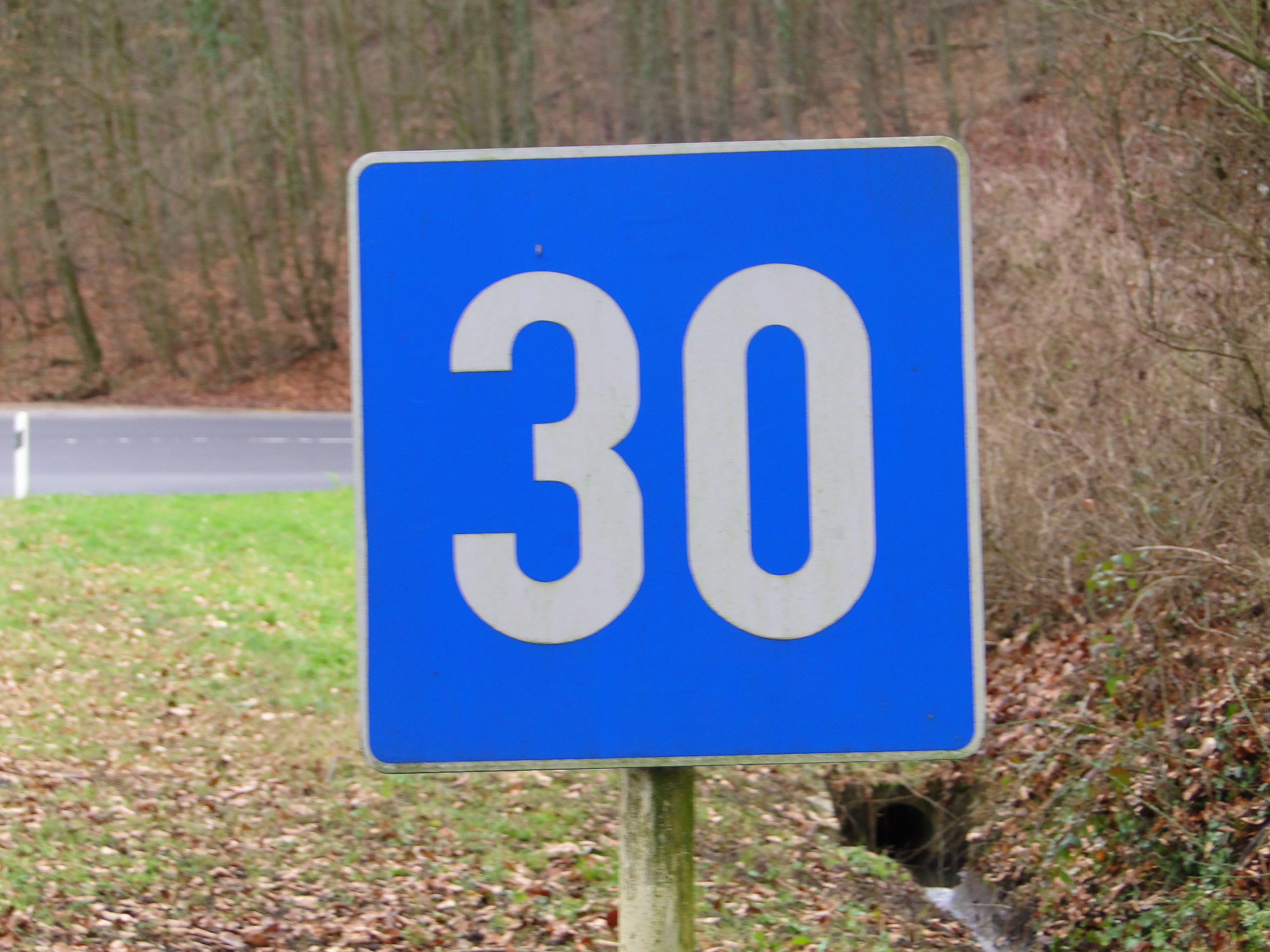 Verkéiersschëld F,18a "Recommandéiert Vitesse" aus dem lëtzebuerger Code de la Route.